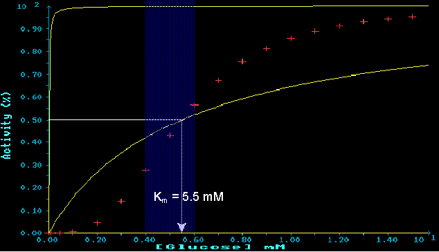 Zum Artikel selbst errechnet und gezeichnet Zum gleichnamigen Artikel selbst angefertigt Juergen Bode 07:33, 8. Jul 2004 (CEST)